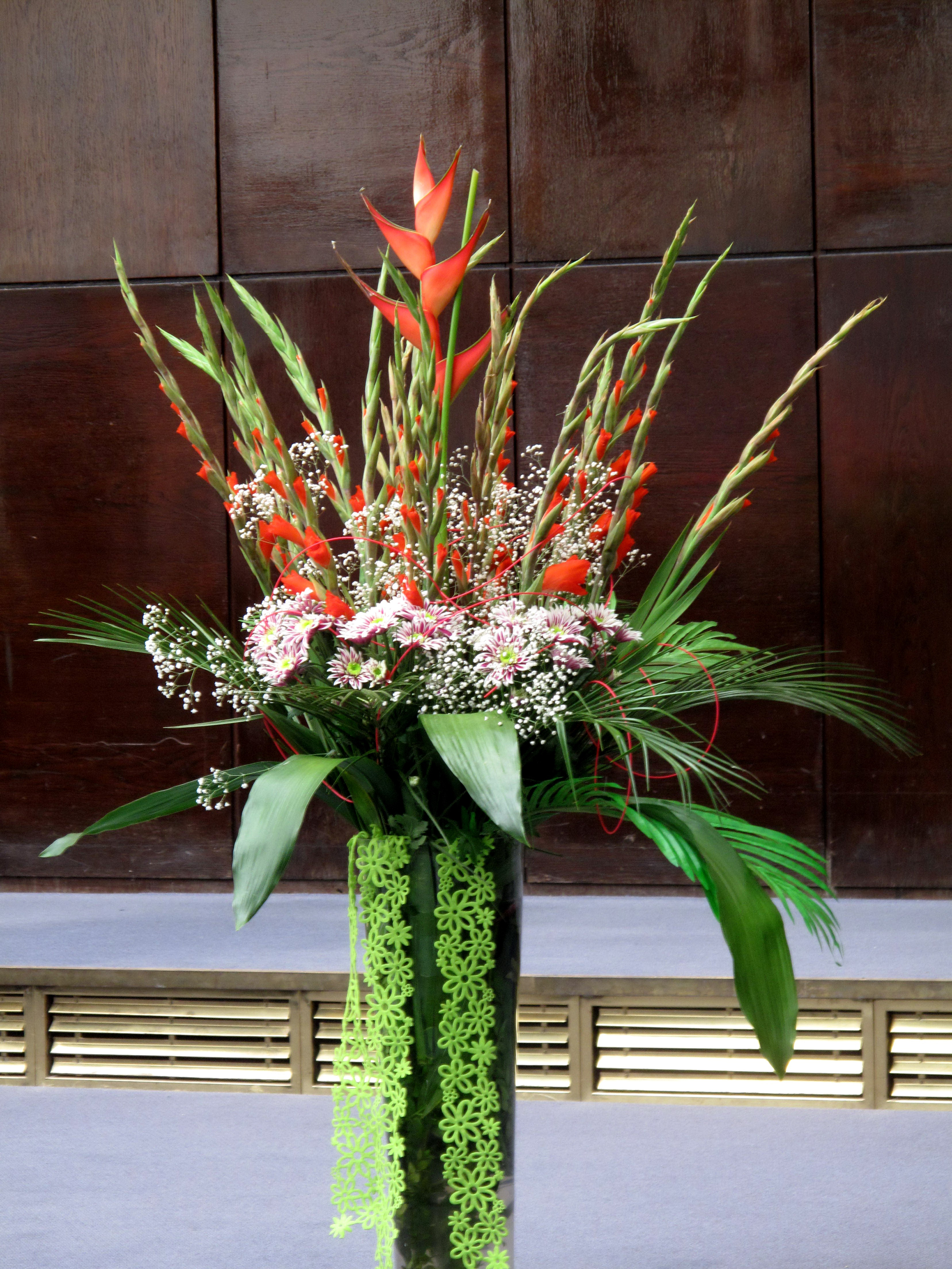 Fotky květů